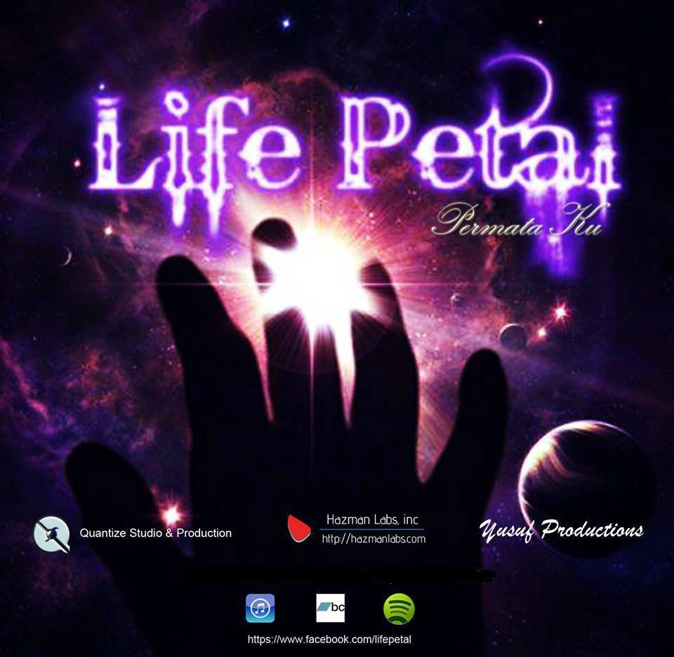 Album Tunggal (Singles) - Life Petal - Permata Ku